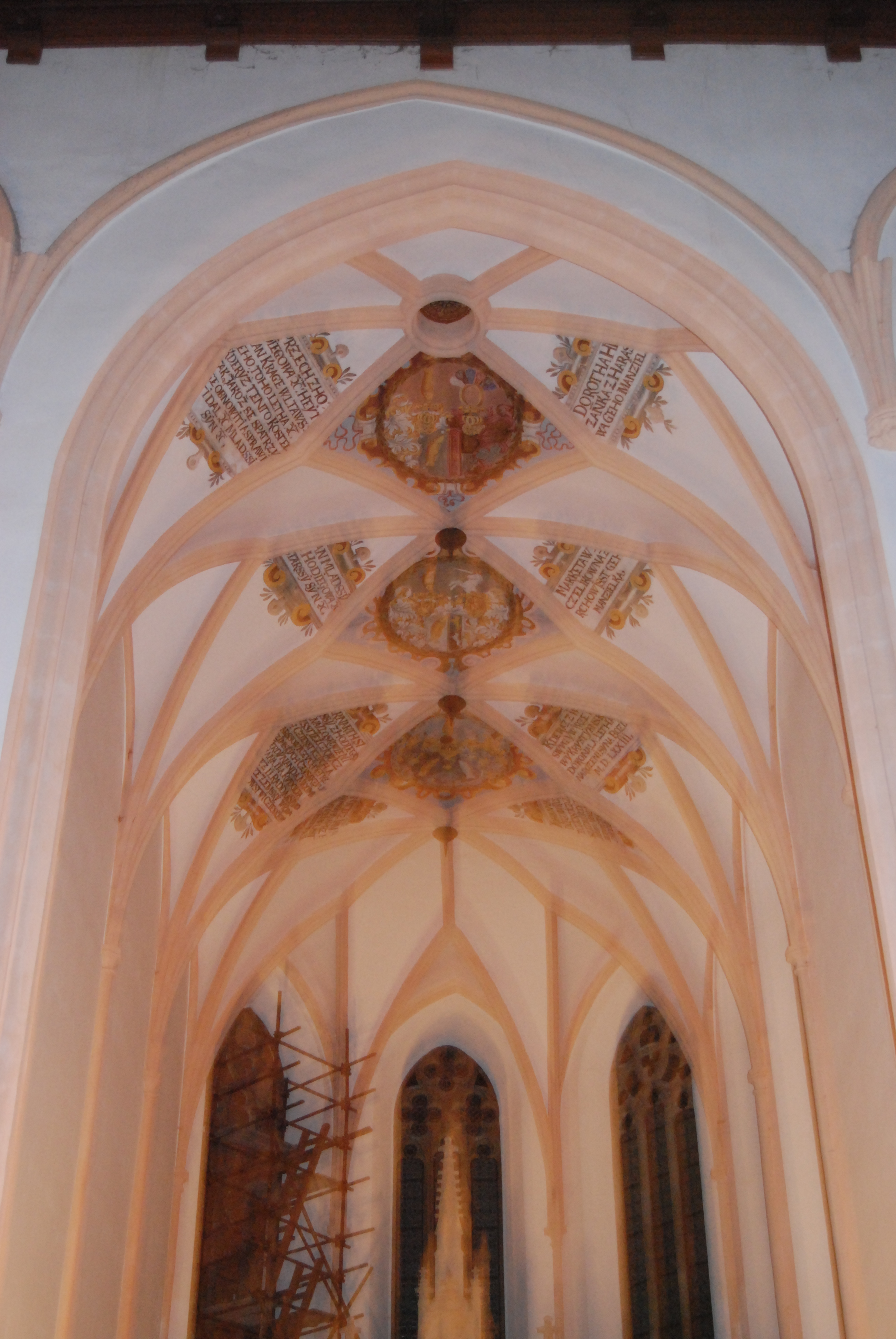 Pohled na stropní výmalby v kostele svatého Jiljí. Noc kostelů 2014. Milevsko. Okres Písek. Česká republika. Object location49° 27′ 26.69″ N, 14° 22′ 07.68″ E